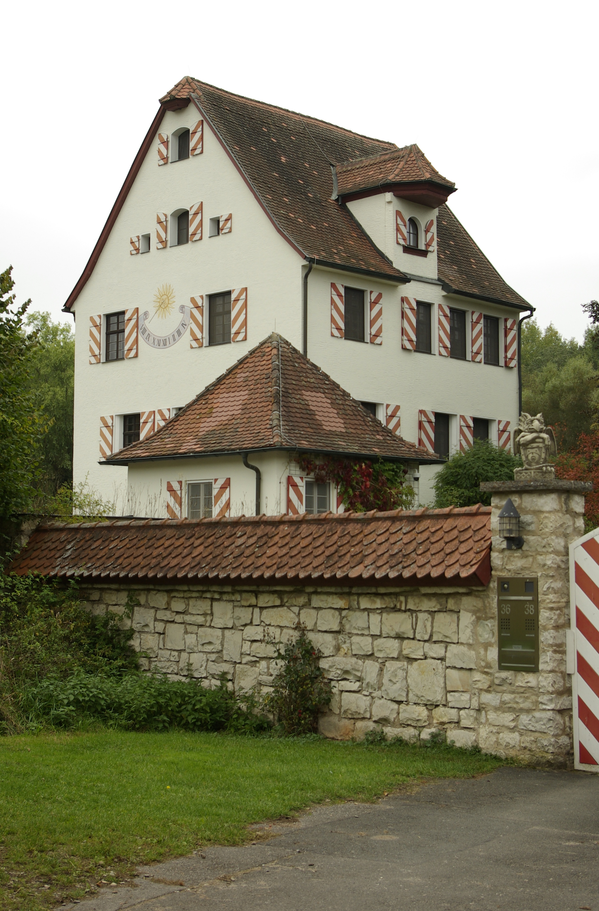 Wasserschloss im Schwabacher Ortsteil Wolkersdorf.